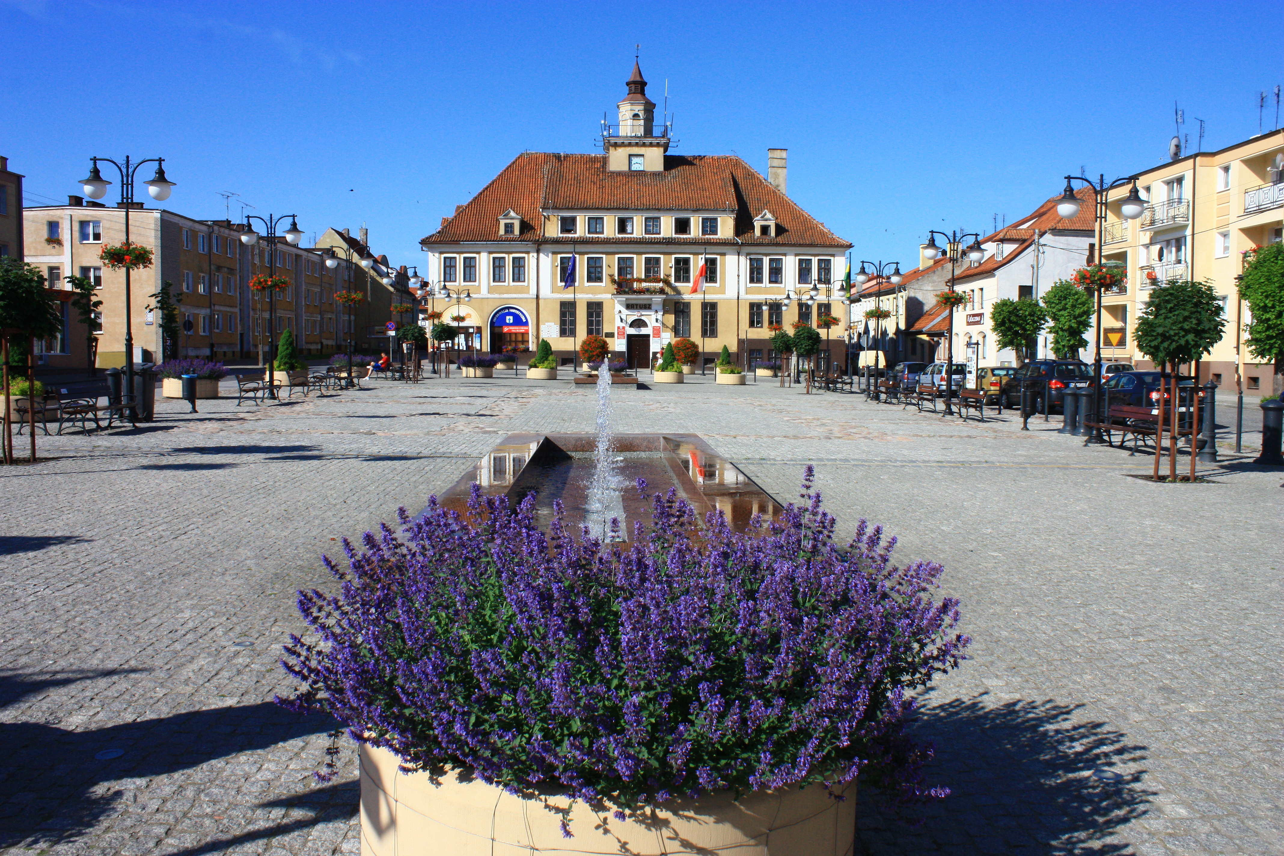 Olsztynek, ratusz, 1915-1923